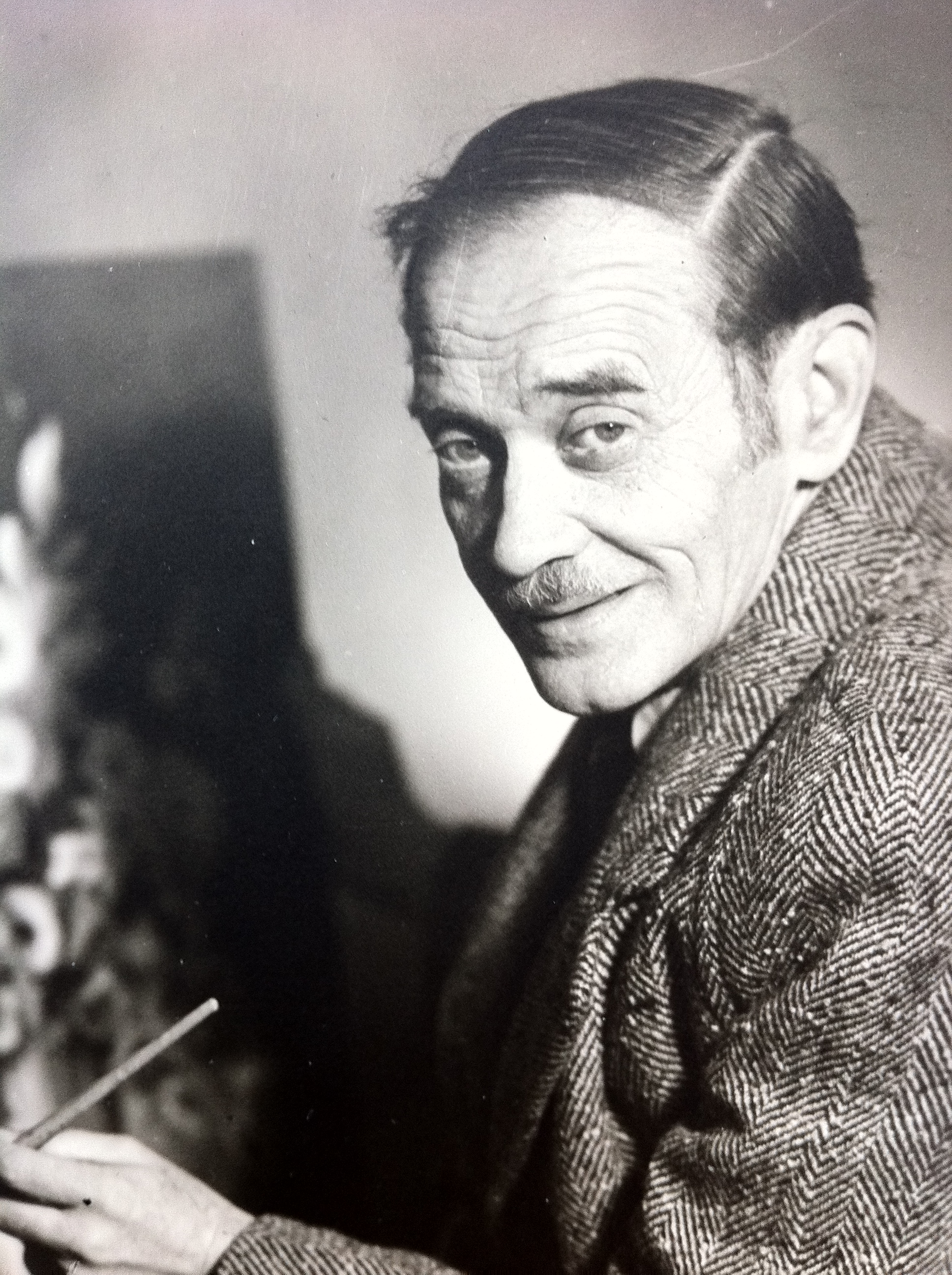 Photographie 1954, Liechtenstein